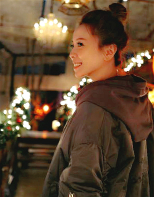 黃雅莉照片攝於宣傳活動2016年12月。